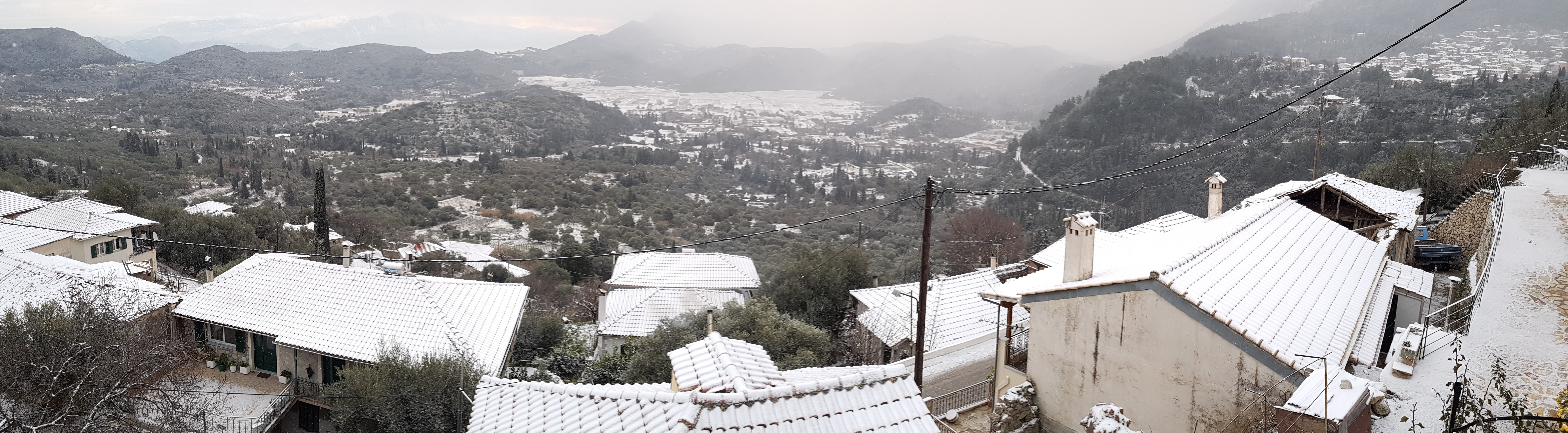 Οι χιονισμένοι Πηγαδησάνοι